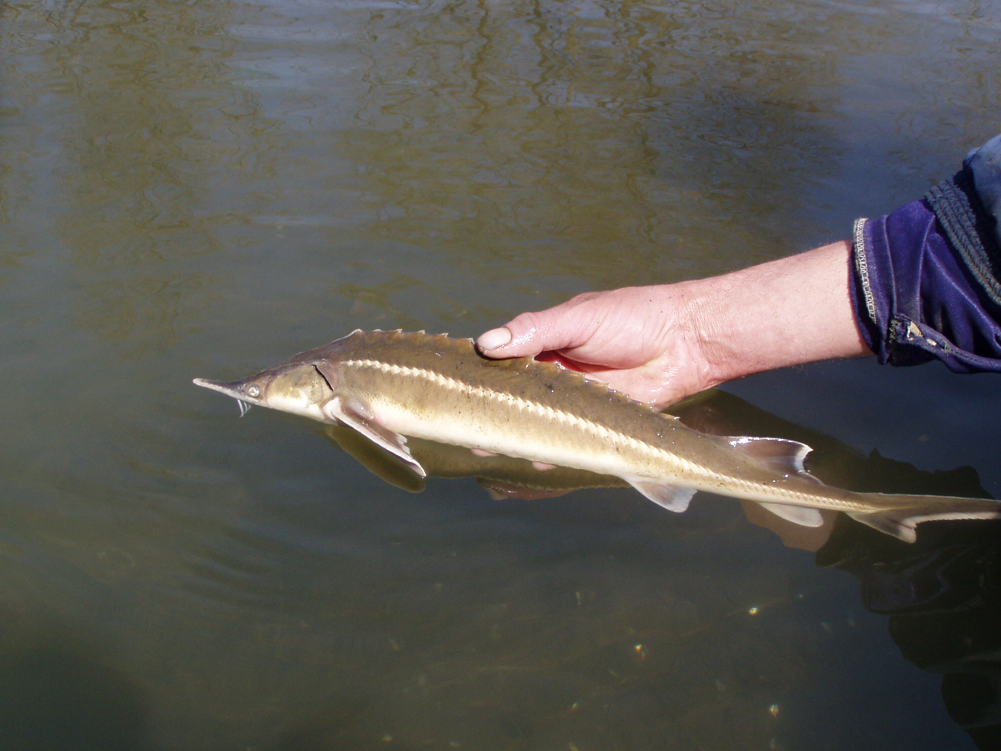 Нижньодністровський, Білгород-Дністровський, Біляївський та Овідіопольський райони